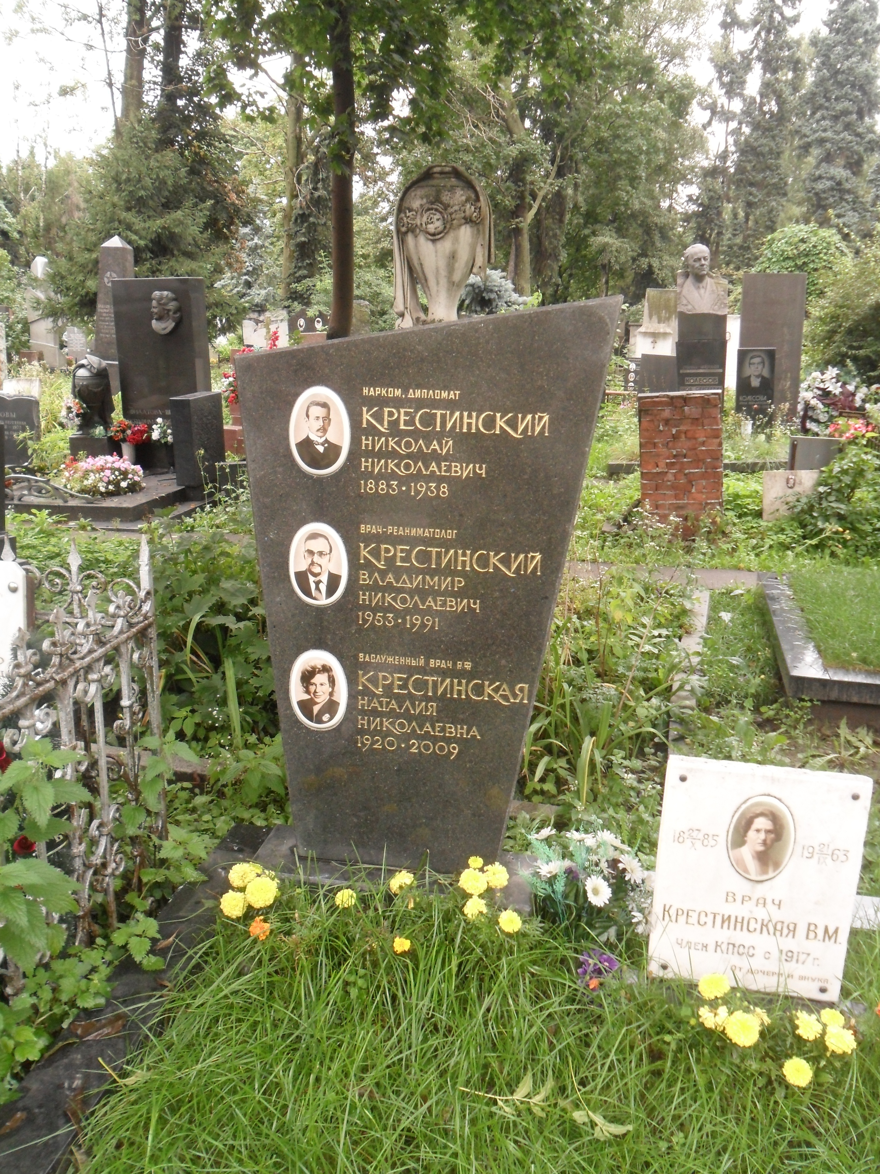 Кенотаф государственному деятелю Николаю Крестинскому на Новодевичьем кладбище.